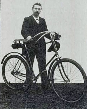 Zelfportret van Geert Jannes Landweer (1859-1924)